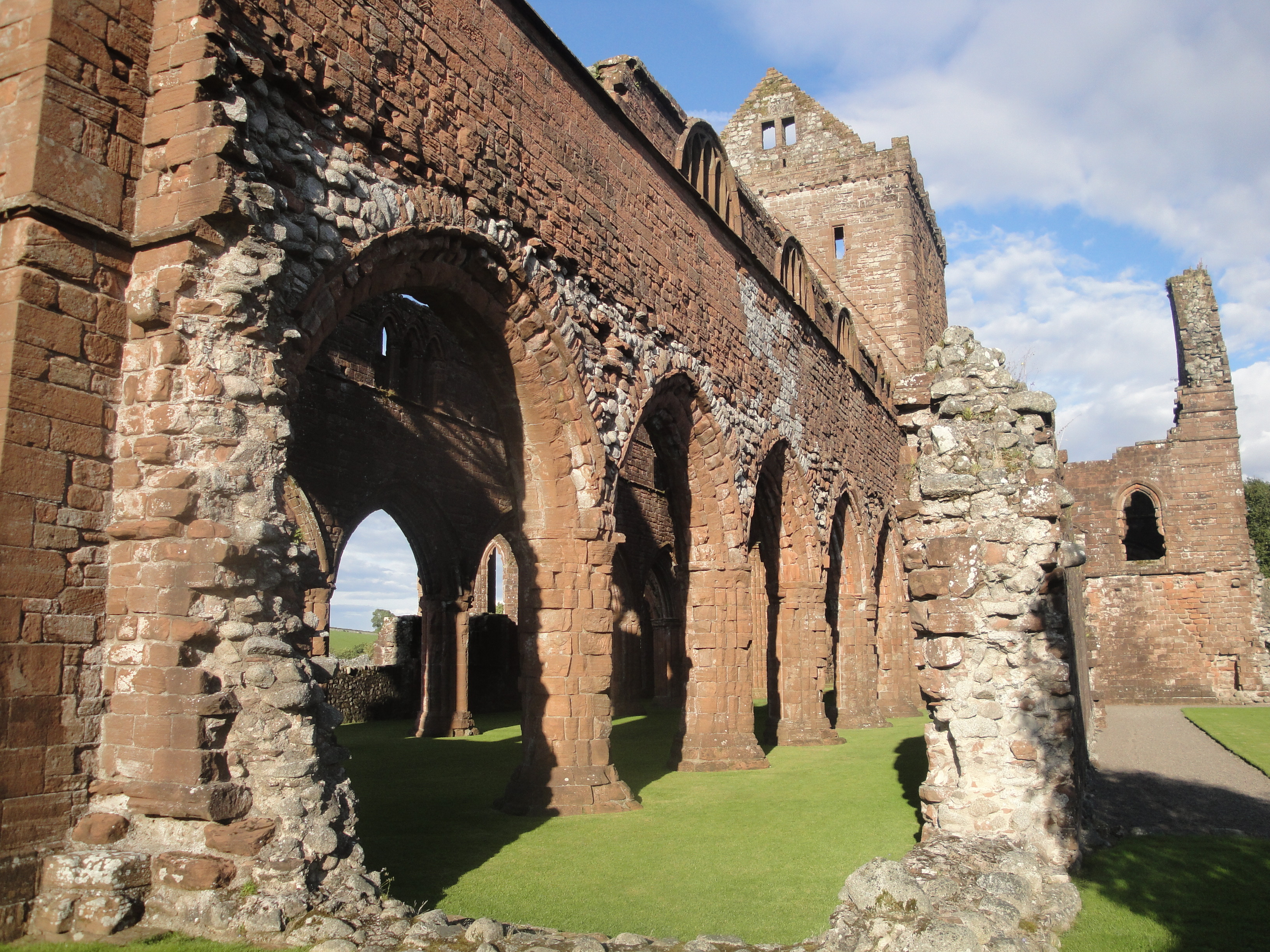 Abbaye de Sweetheart New Abbey